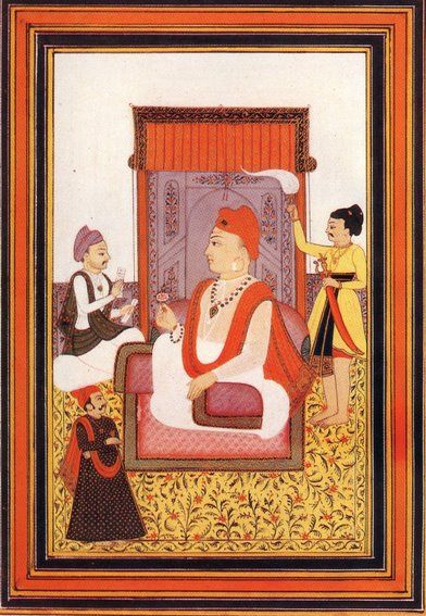 Narayan Rao